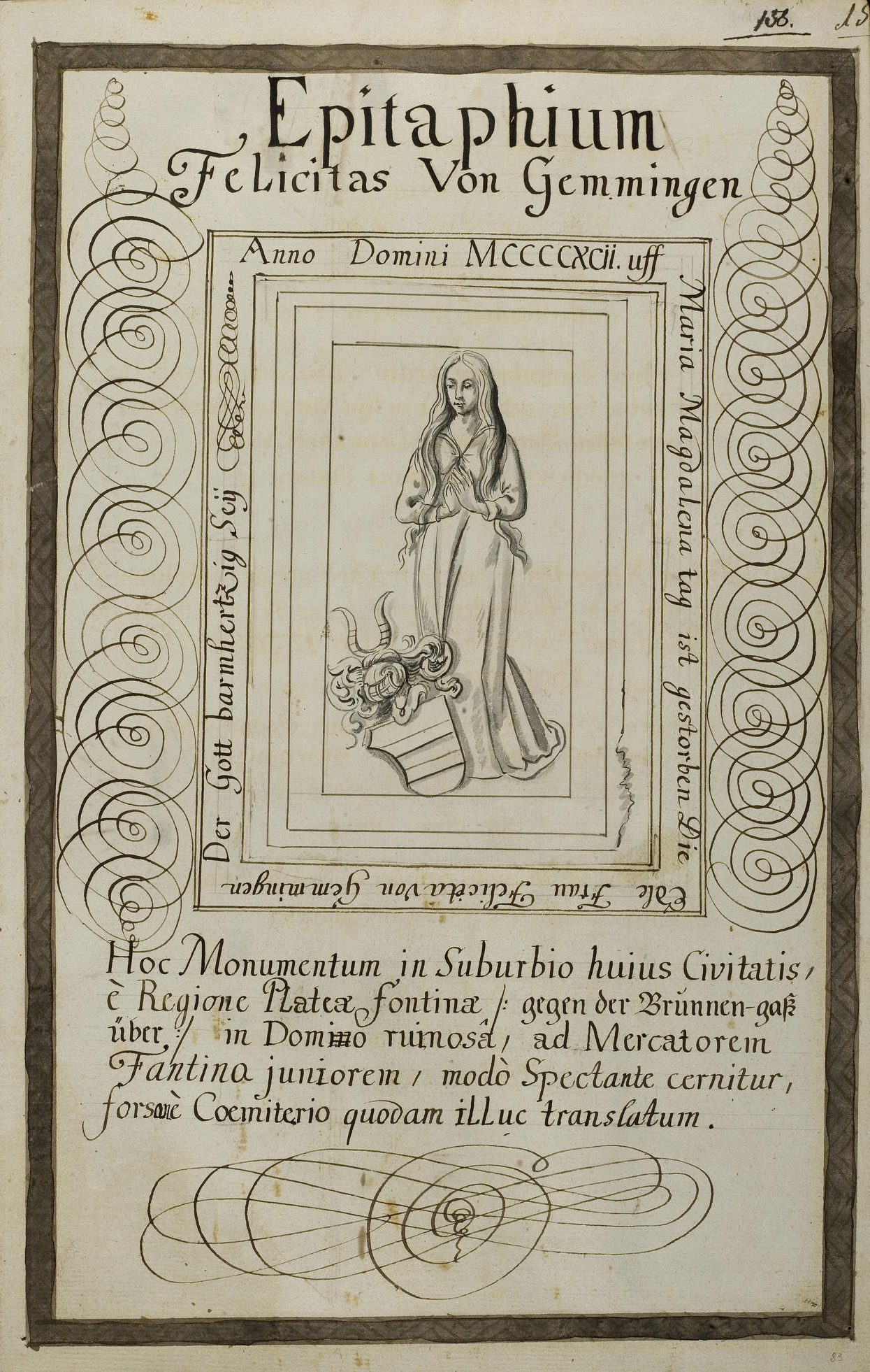 Abzeichnung des Epitaphs der Felicitas von Gemmingen († 1492). Quelle: München, Bayerisches Hauptstaatsarchiv - Geheimes Hausarchiv, Hs. 317 (1), Thesaurus Palatinus (Band 1): Heidelberg und Mannheim. Heidelberg, 1747-1752, Fol. 83r